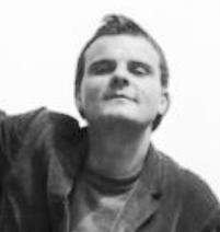 Kovács Lajos magyar színész.